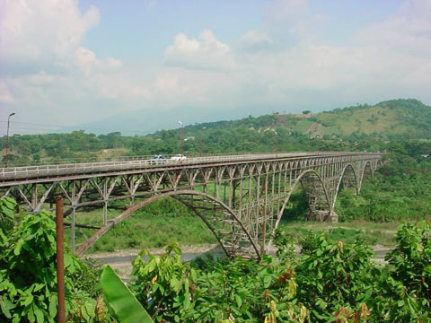 Il Ponte di El Vigia sul Fiume Chama.